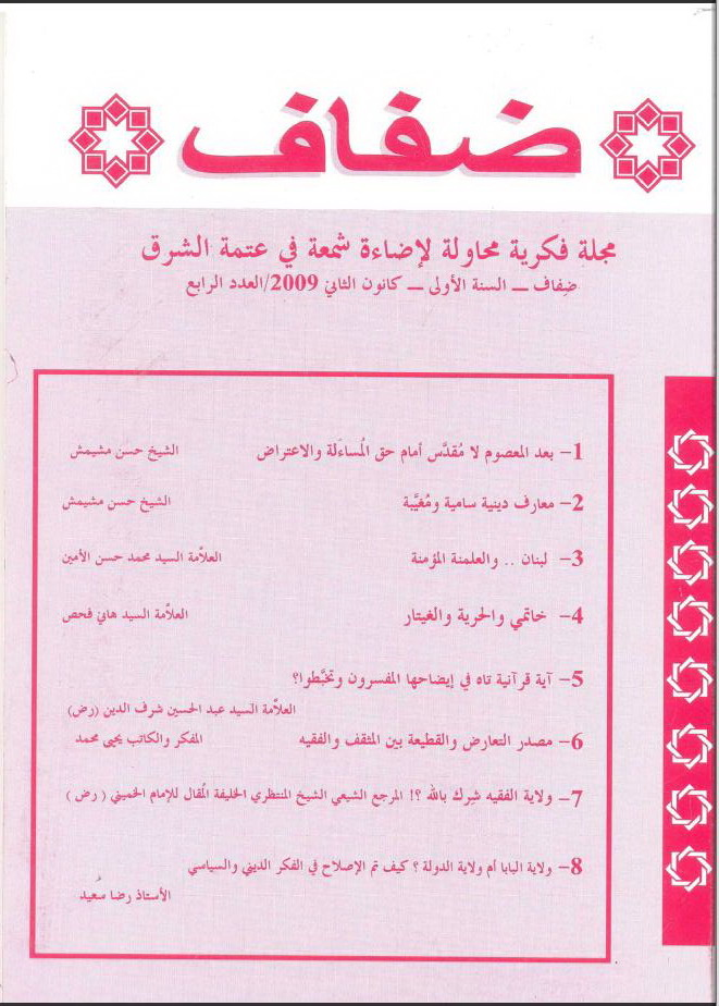 أحد أغلفة أعداد مجلة (ضفاف) التي يصدرها الشيخ حسن مشيمش